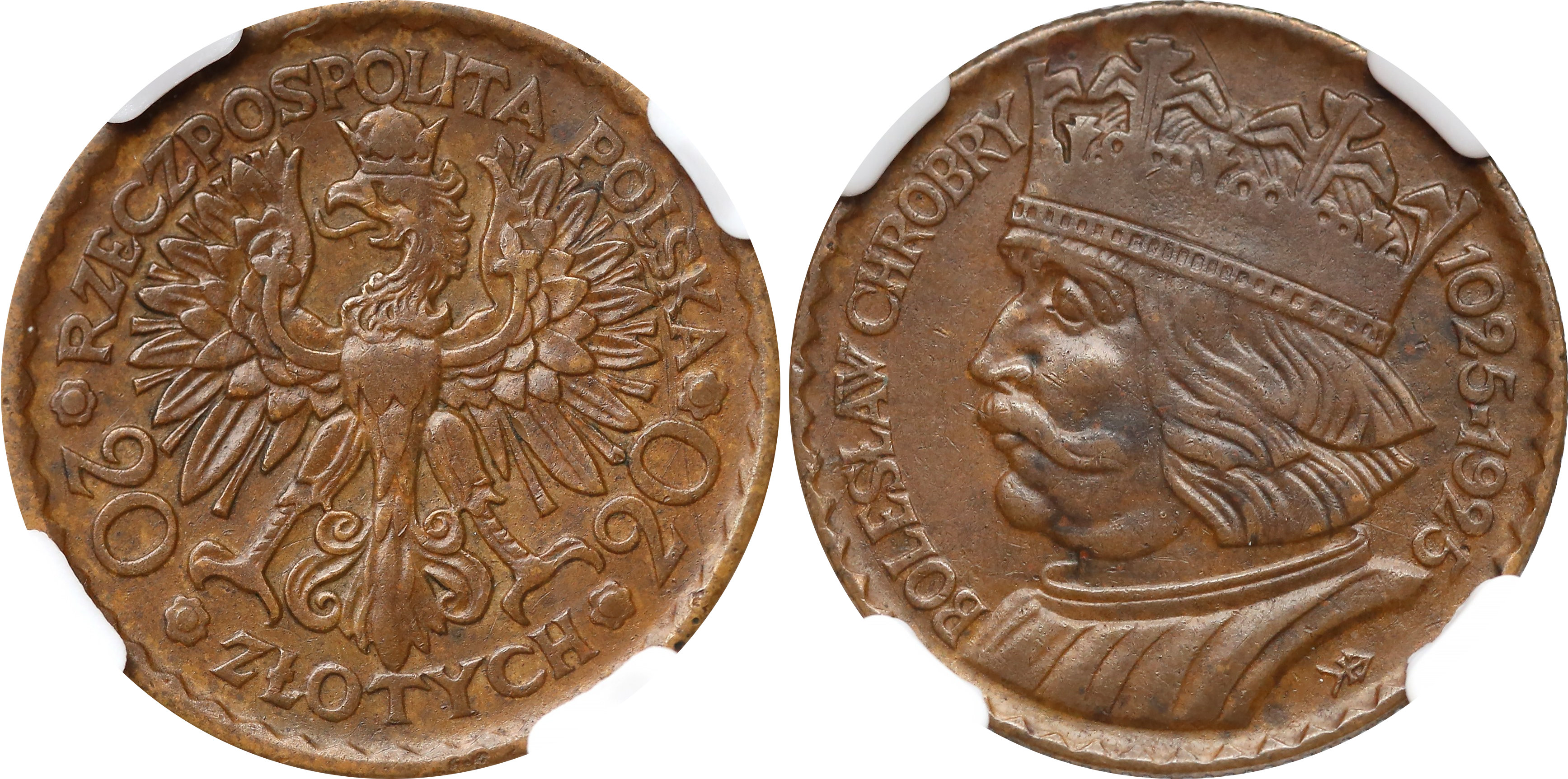 PRÓBA 20 złotych 1925 Bolesław Chrobry brąz